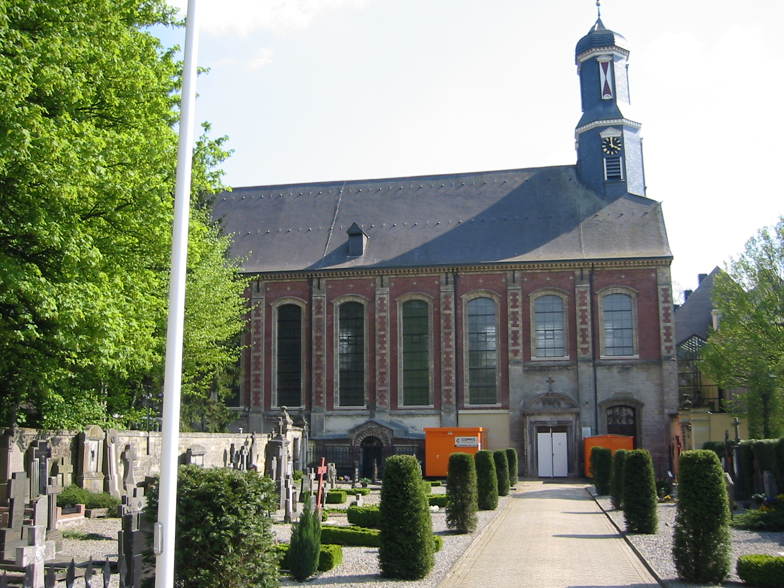 Eigen foto. GerardM 10 mei 2004 22:28 (CEST)